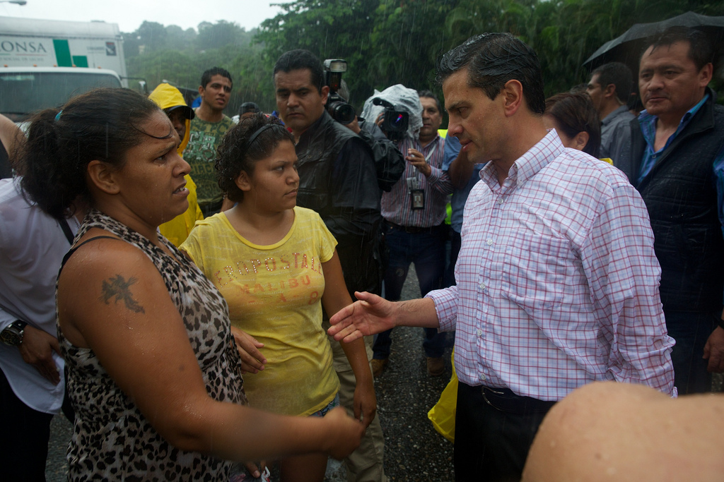 Recorrido a zonas afectadas de Acapulco, por la tormenta "Manuel". Acapulco de Juárez, Guerrero. 16 de septiembre de 2013.